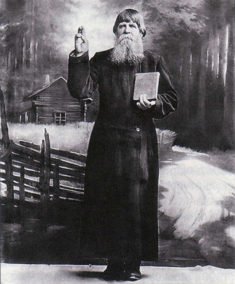 Крестьянин-старообрядец. Олонецкая губерния.